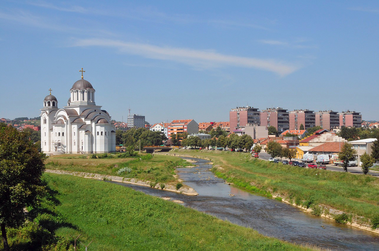 Valjevo